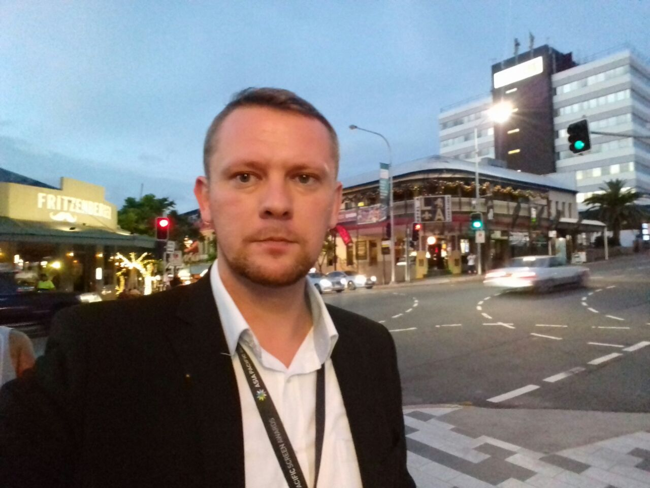 Саха тыла: Давыдов Дмитрий Леонидович, киинэ режиссера, Аустралиаҕа, Брисбен куоракка